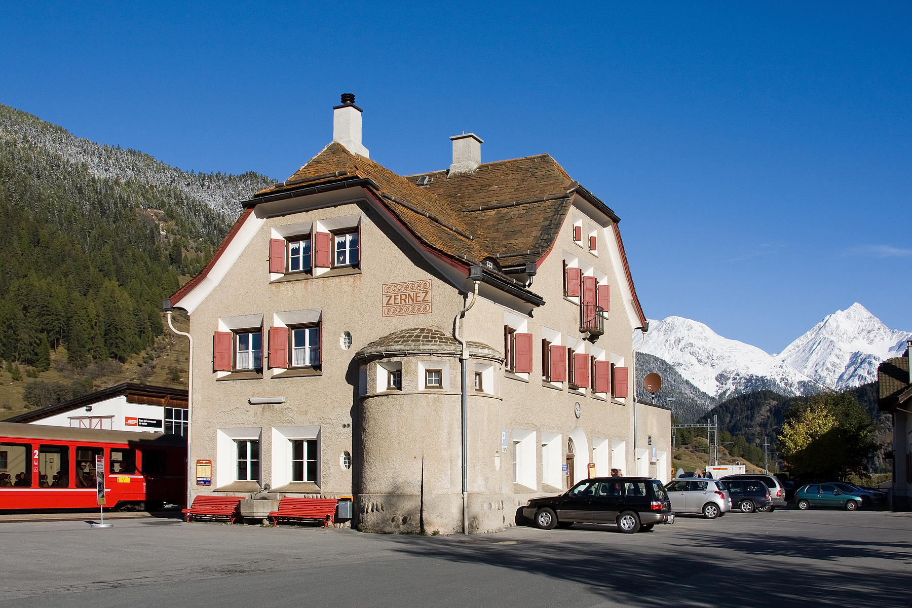 Bahnhof (Staziun) der RhB in Zernez (GR)